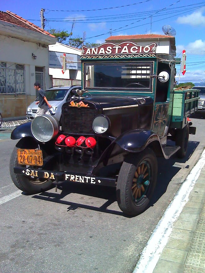 "Anastácio" restaurado - fotografado em Pindamonhangaba/SP em 23/11/2008